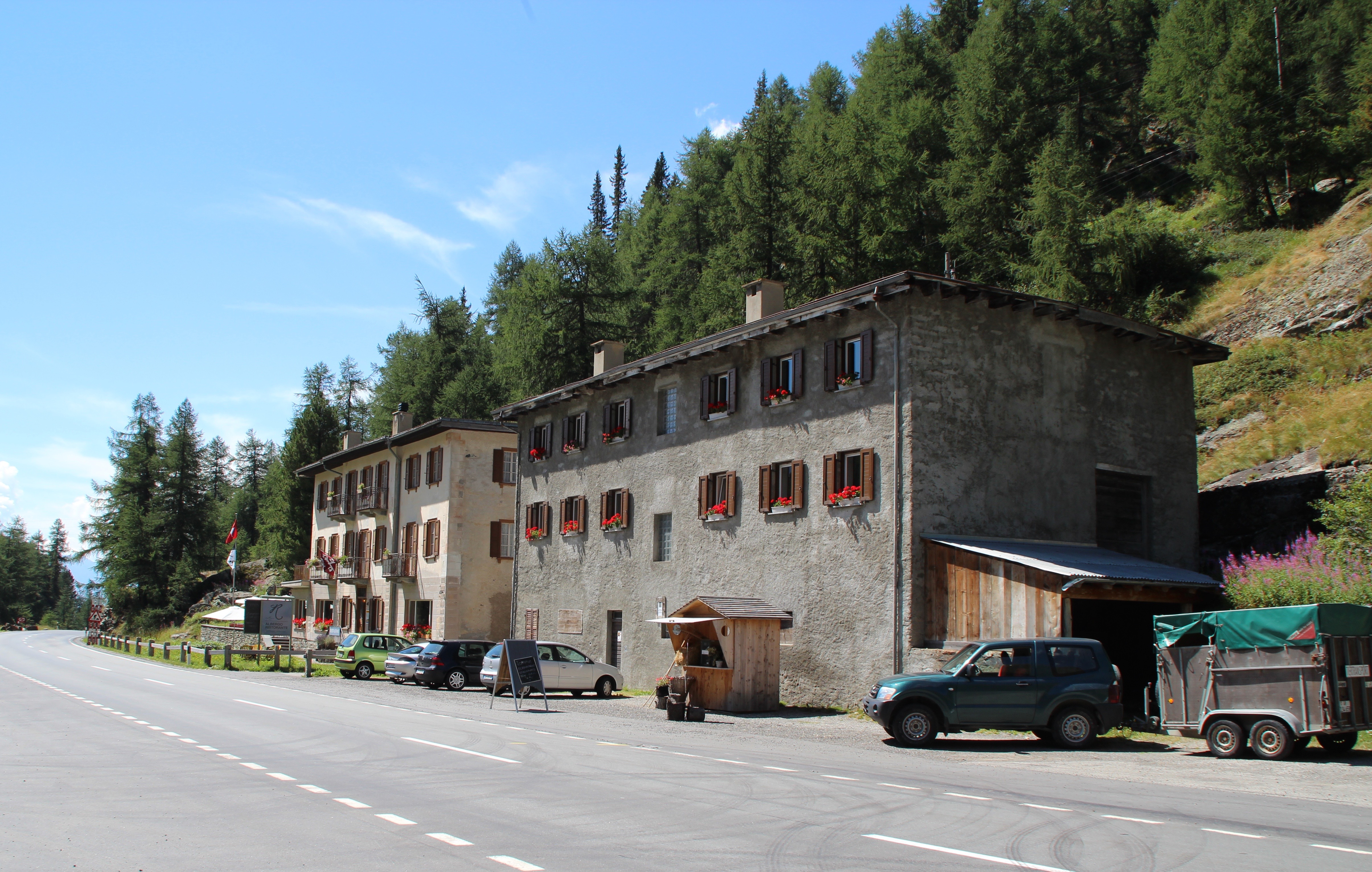 La Rösa